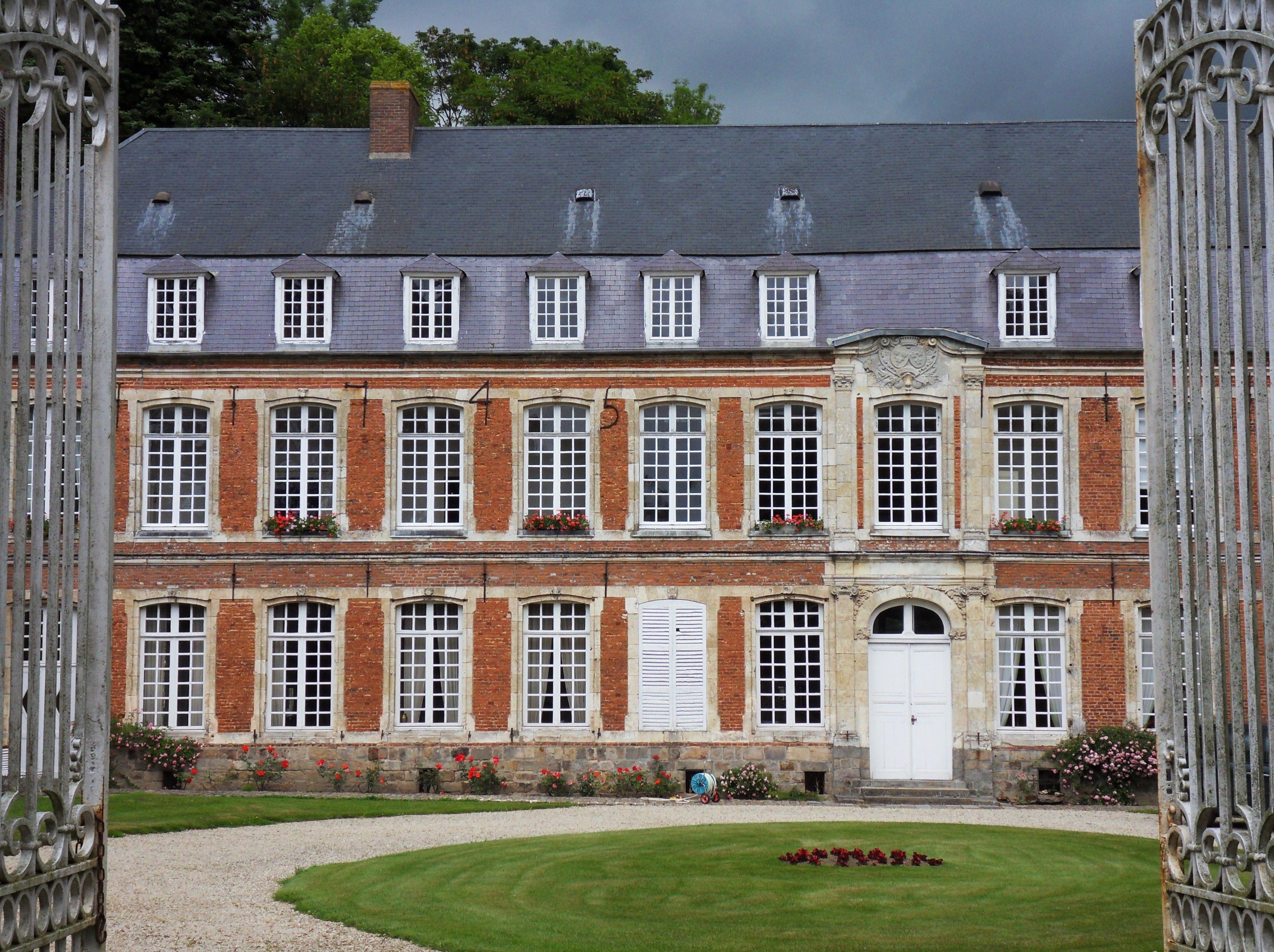 Hénu (Pas-de-Calais, France). Le château.